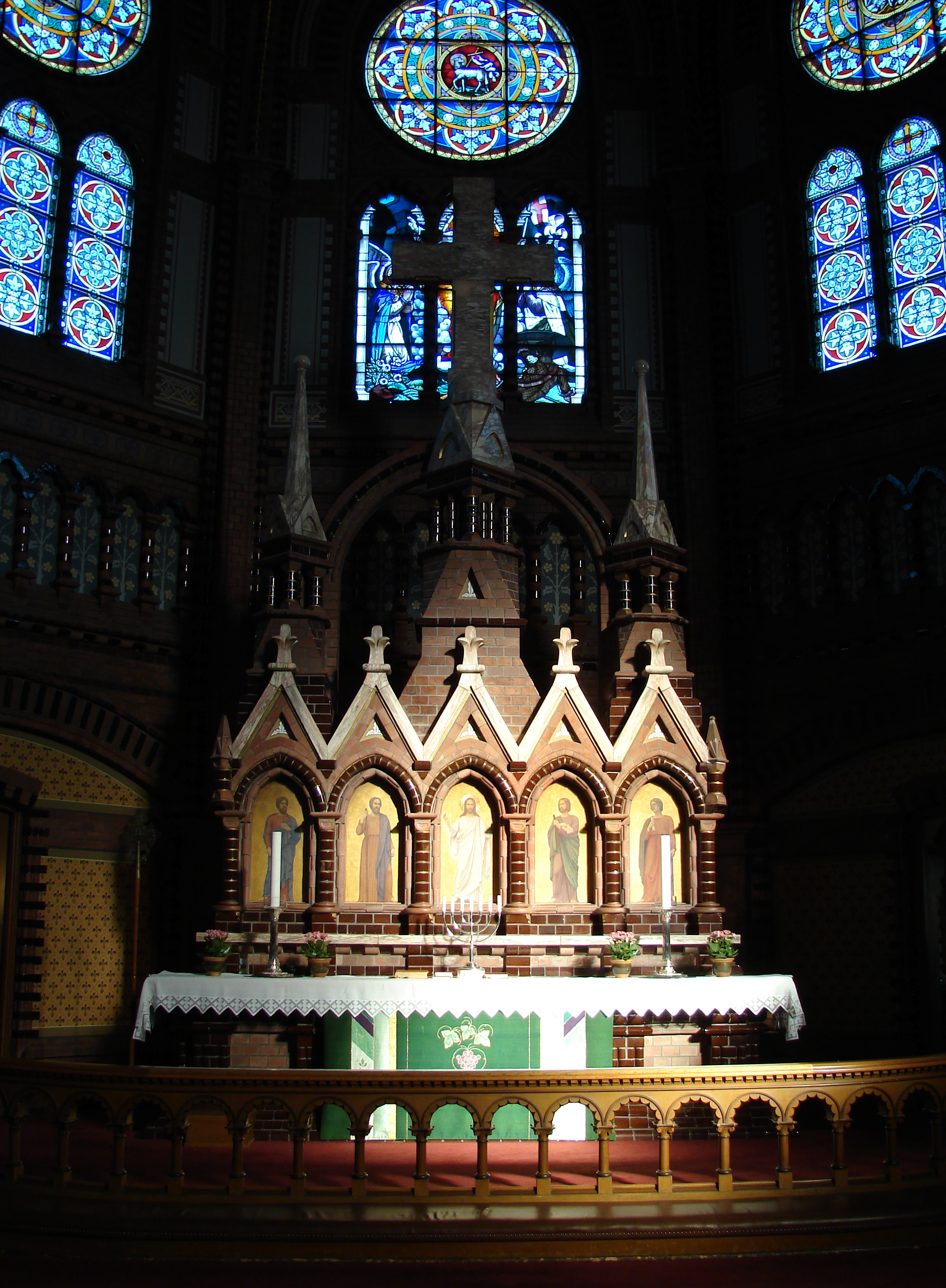 Alter og glasmalerier i Skien Kirke, Skien, Norge